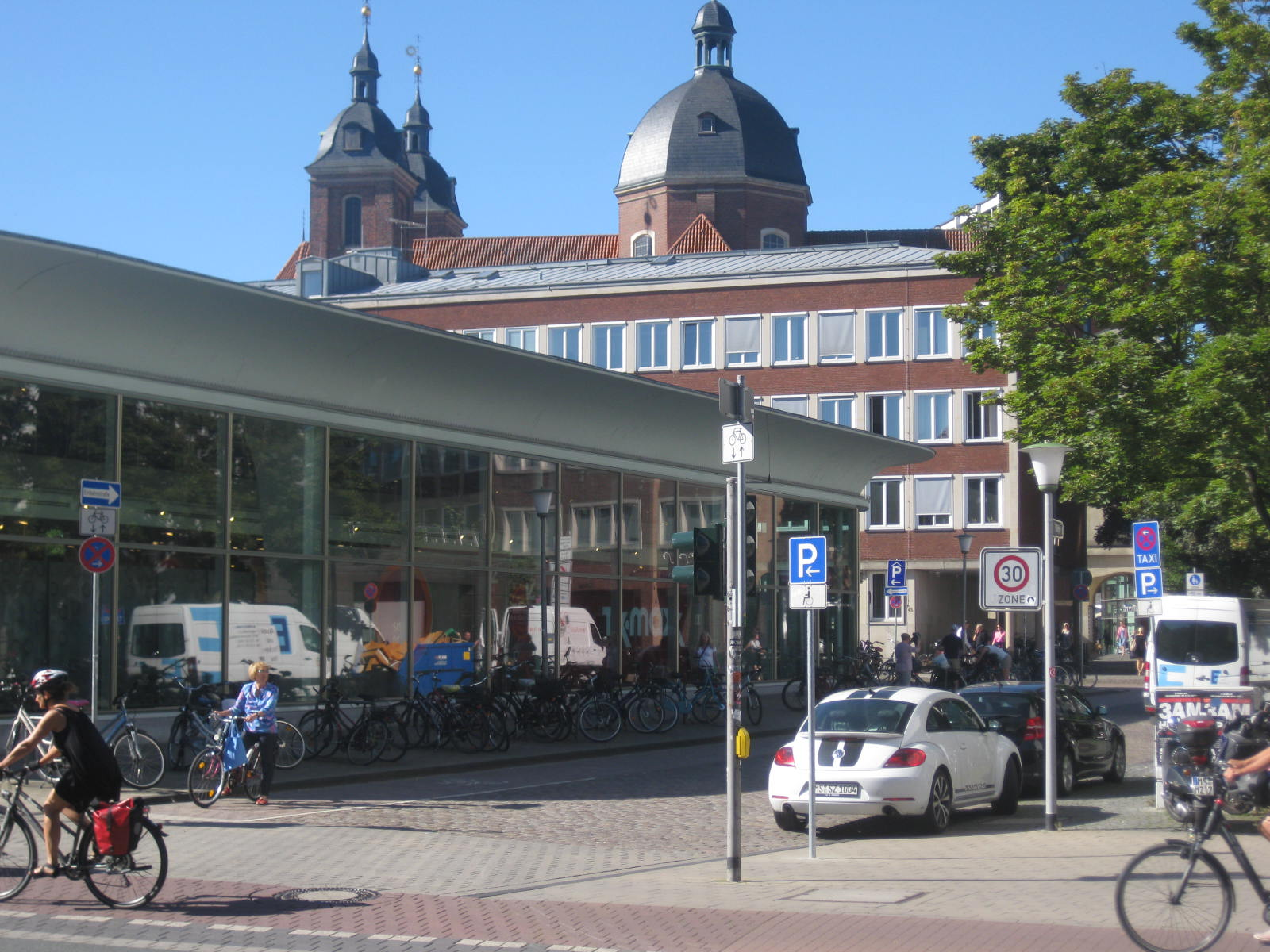 Westdeutsche Nachkriegsmoderne im Wiederaufbau der Altstadt von Münster, Architekt Behördenhaus: Staatsneubaueitung Münster 1959